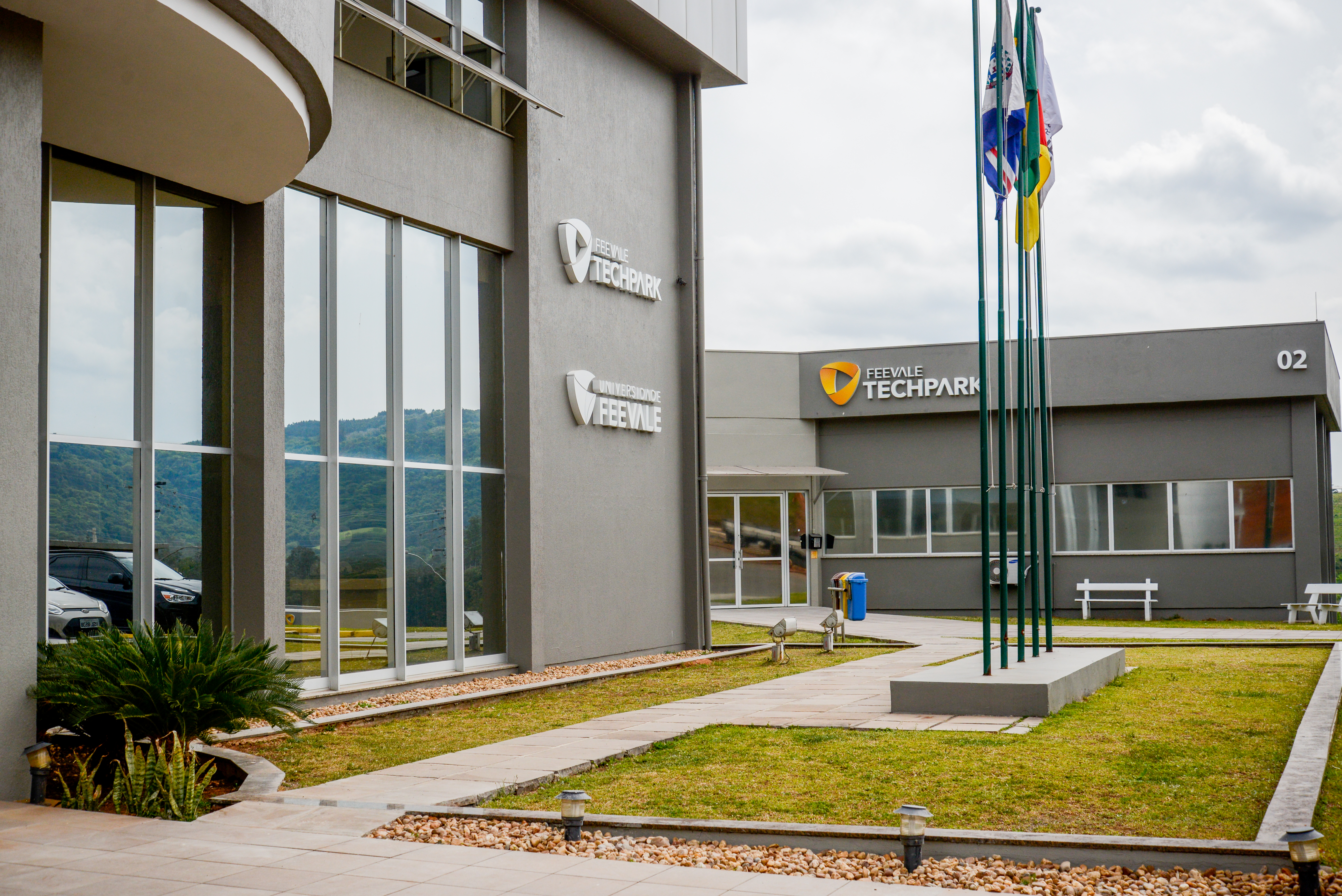 Fachada externa Feevale Techpark em Campo Bom.